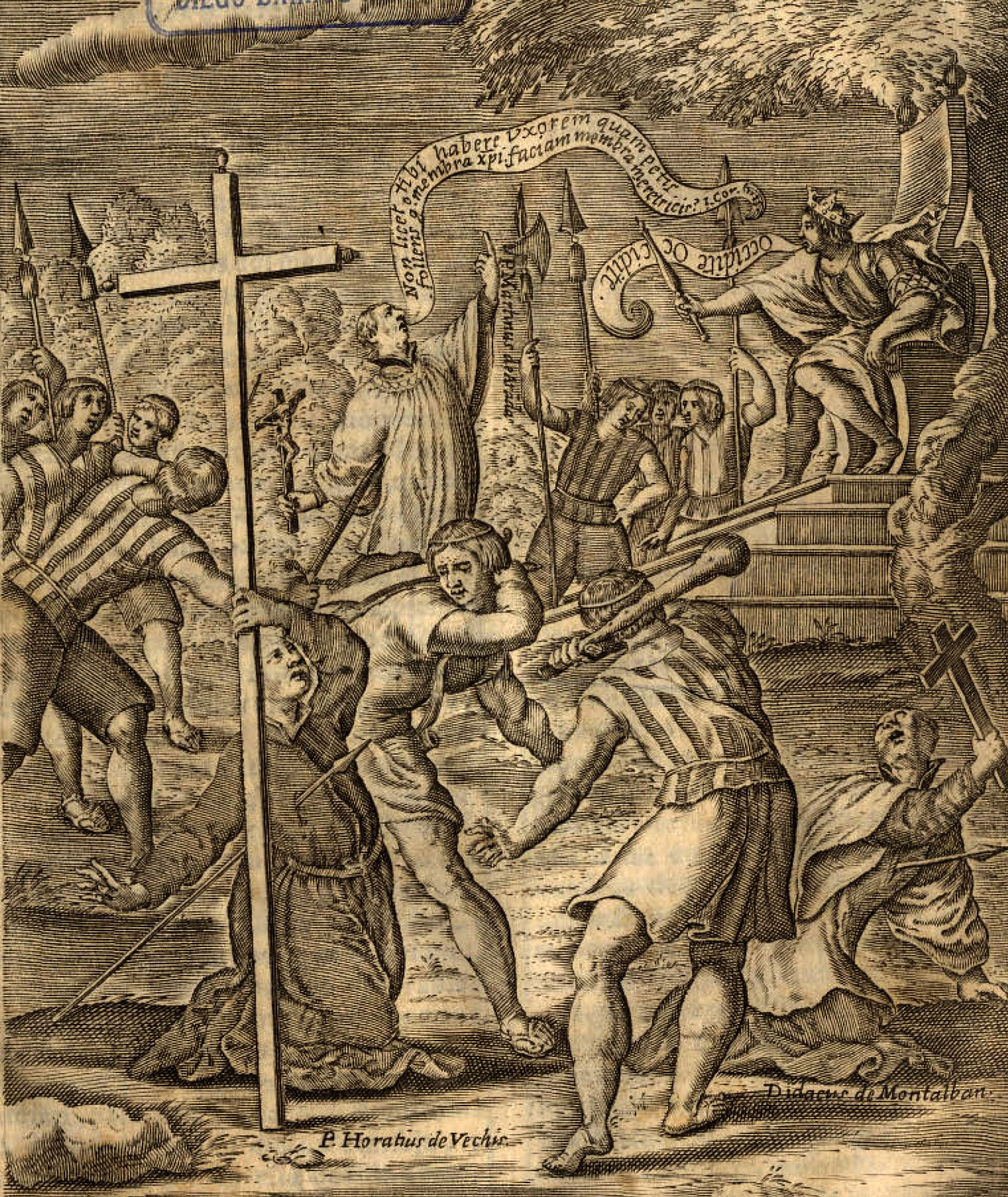 Martires de Elicura. Sacerdotes jesuitas siendo asesinados por guerreros mapuches en 1612